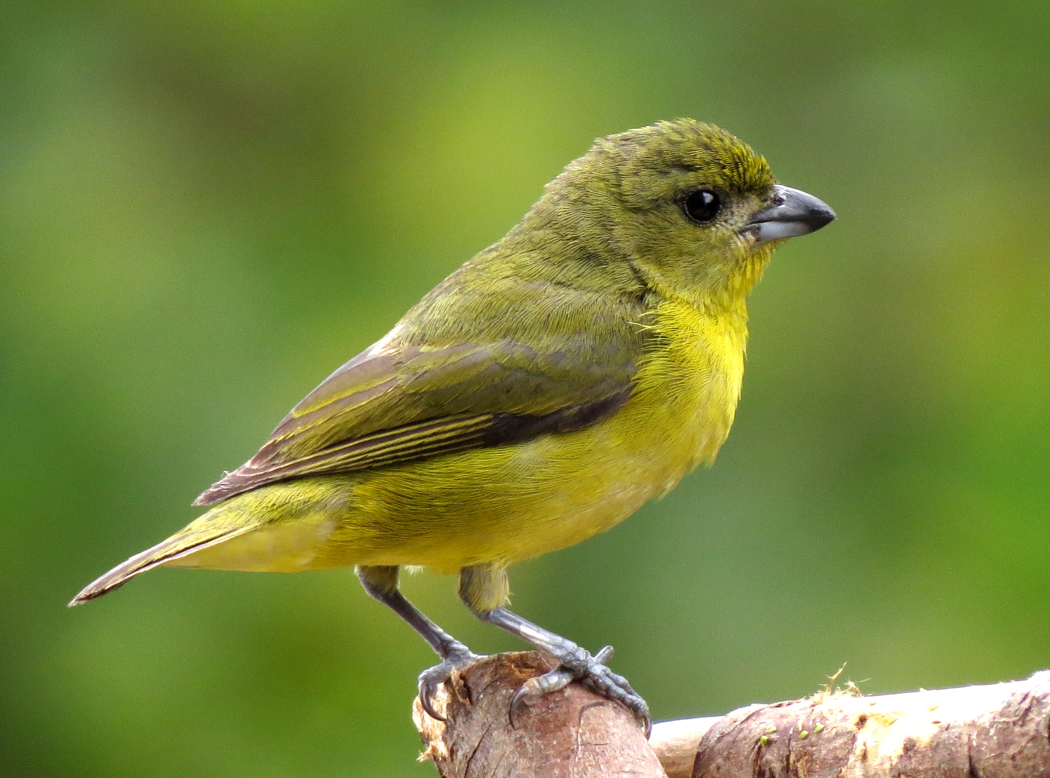 Euphonia laniirostris (Eufonia gorgiamarilla) - Hembra